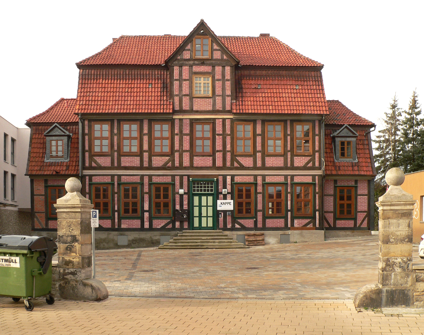 Vorsfelde, Amtsstraße 47, Amtshof